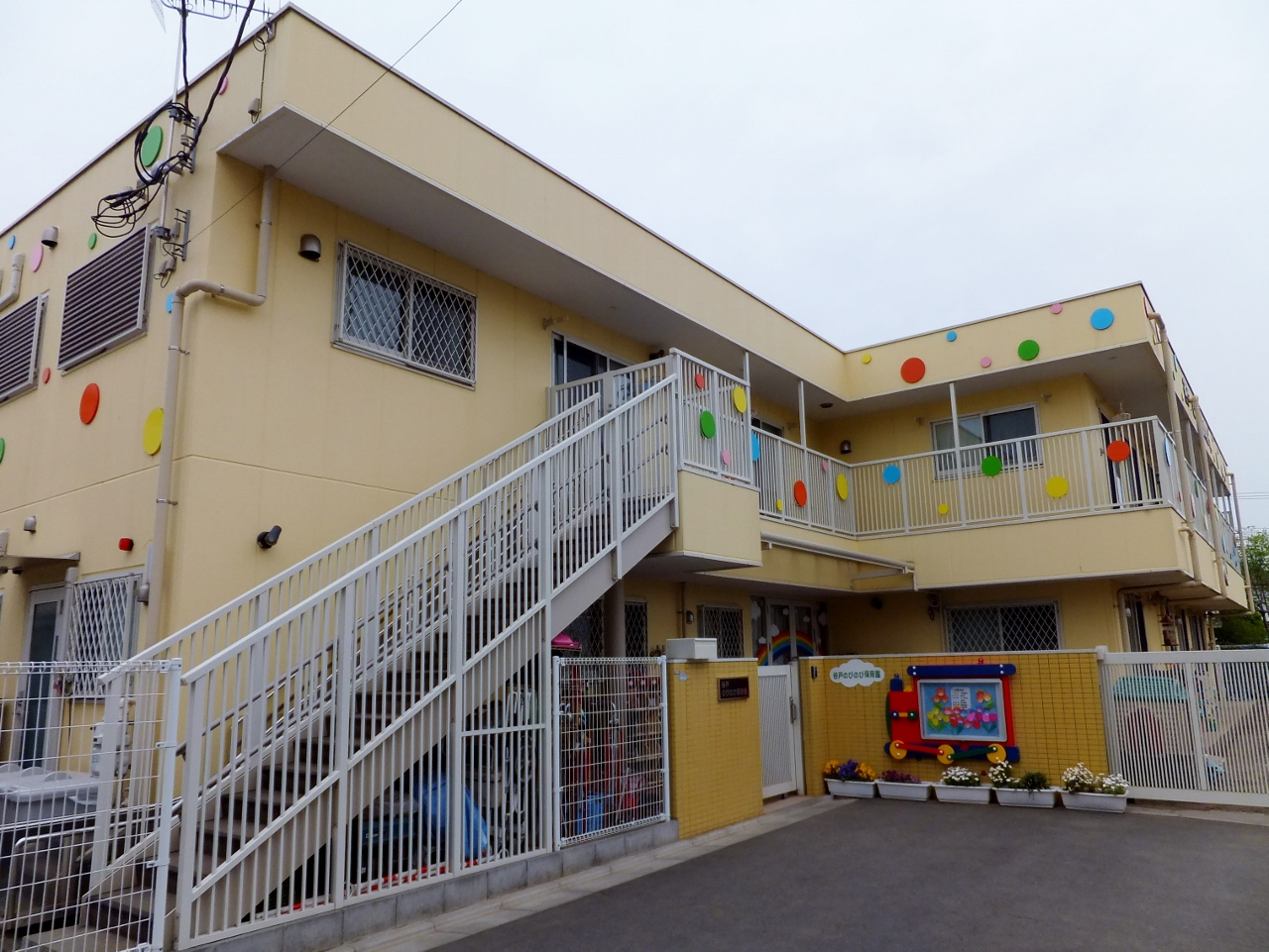 谷戸のびのび保育園 2016年4月10日撮影